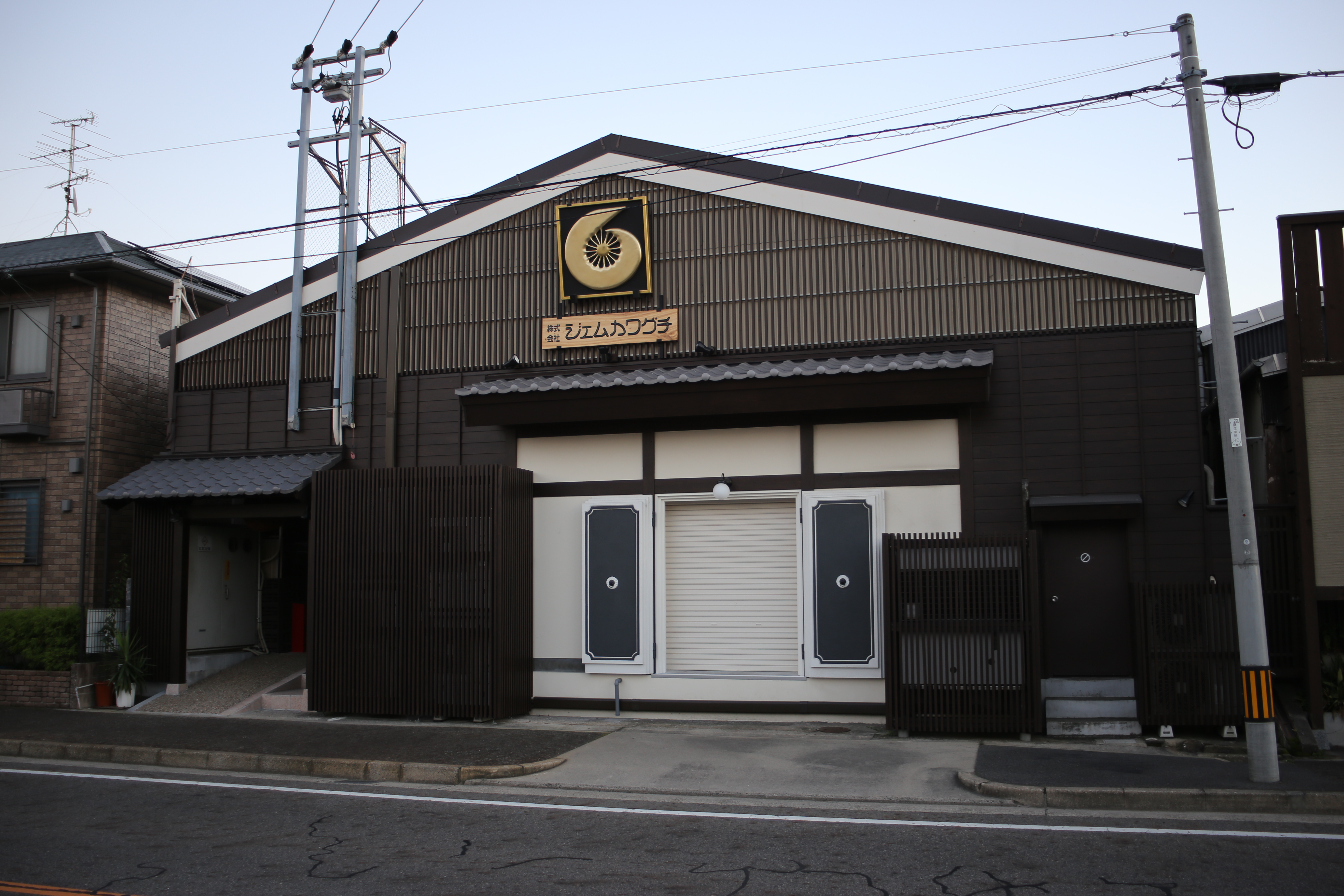 名古屋市中村区稲上町のジェムカワグチ本社を北側公道西側より撮影